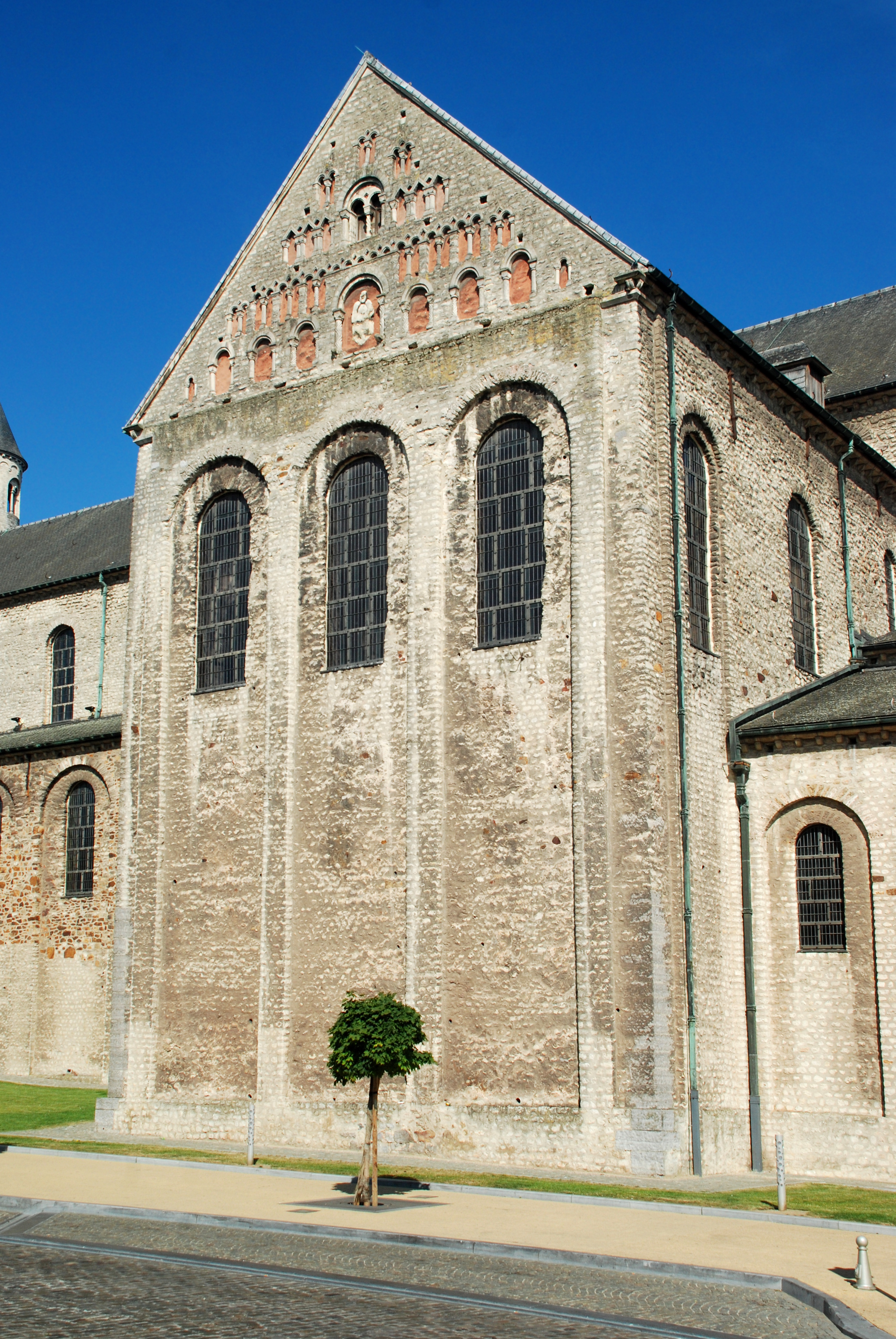 Belgique - Brabant wallon - Nivelles - Collégiale Sainte-Gertrude